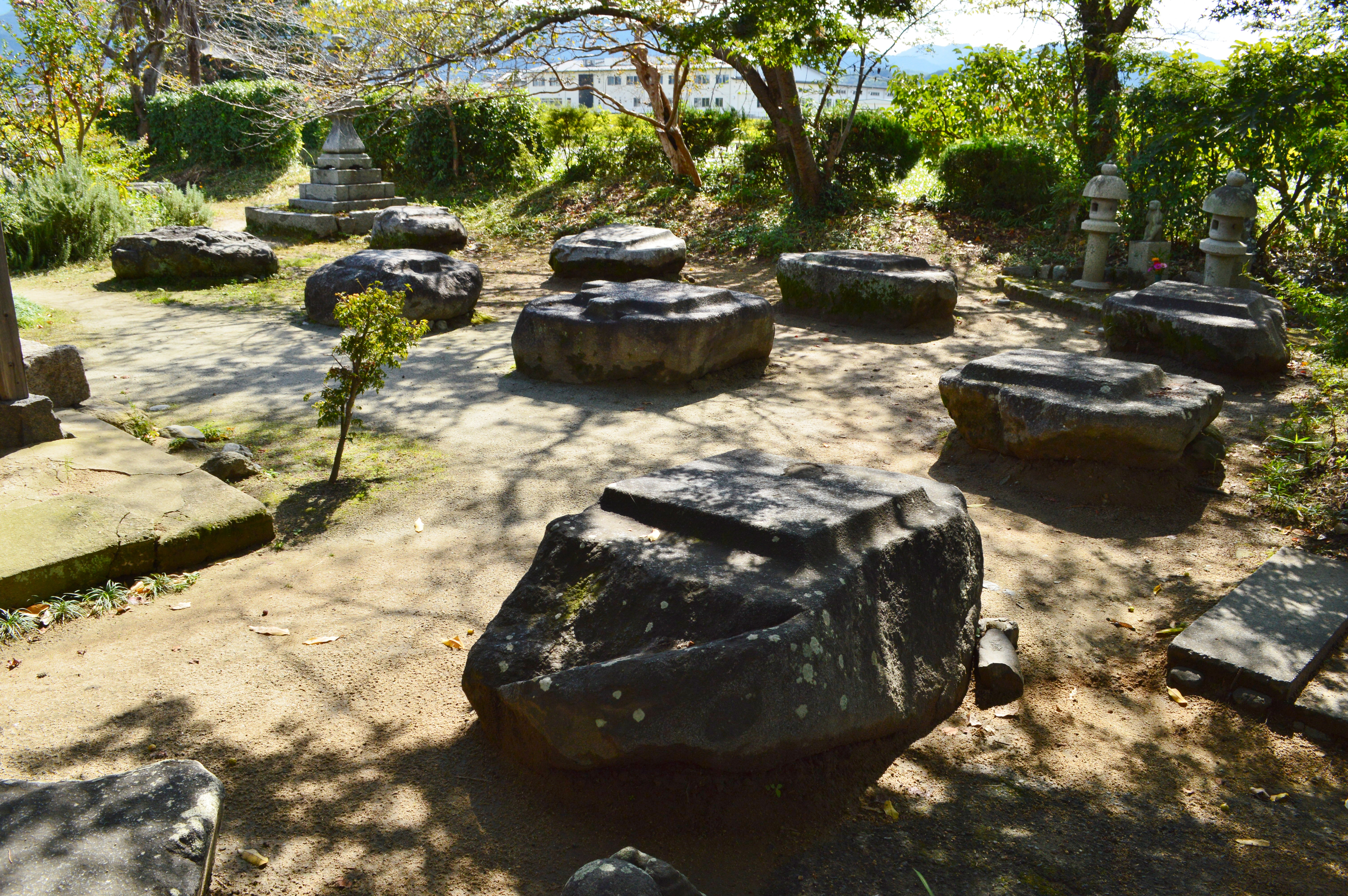 本薬師寺跡 境内礎石